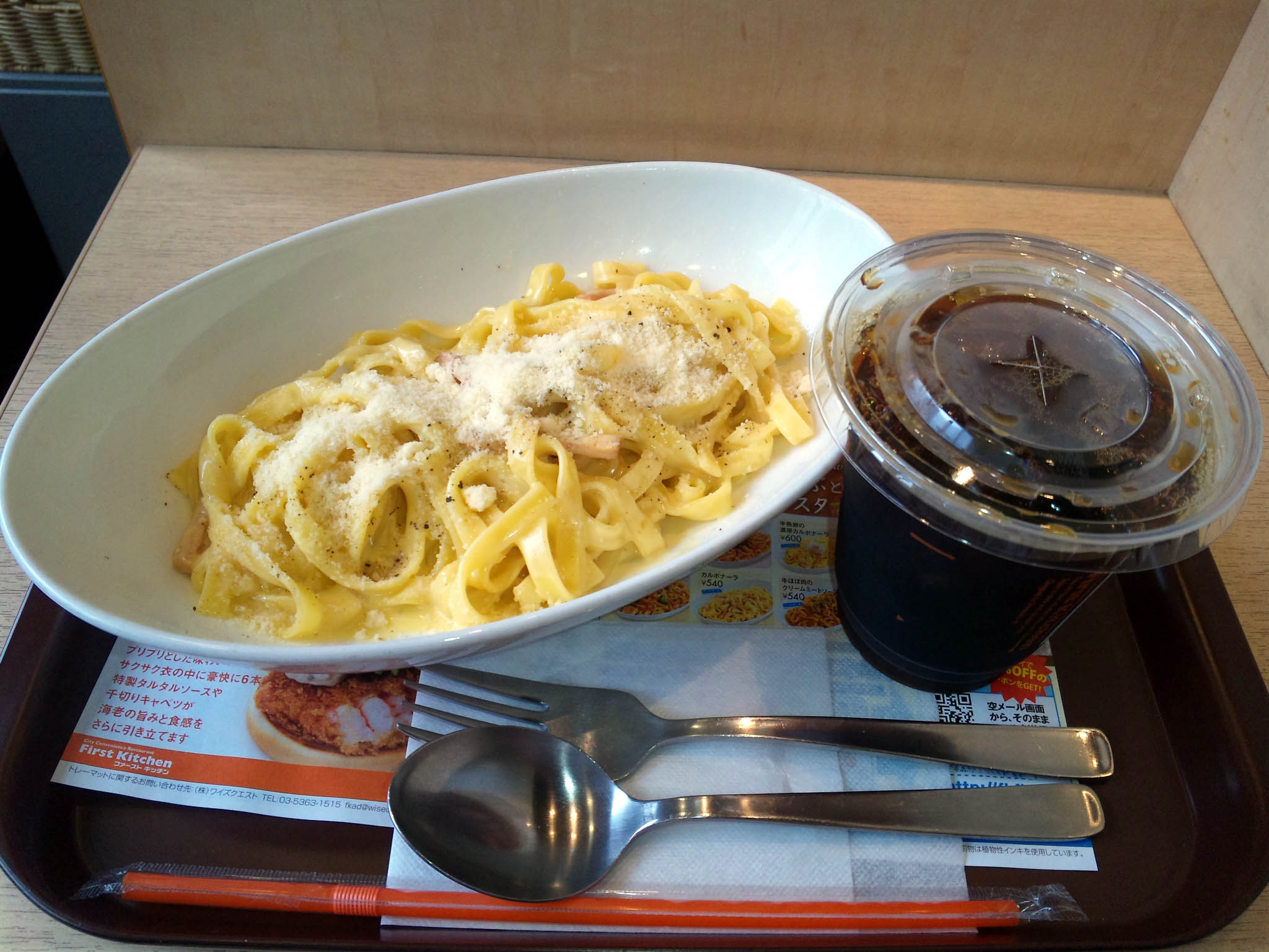 ファーストキッチンのカルボナーラ